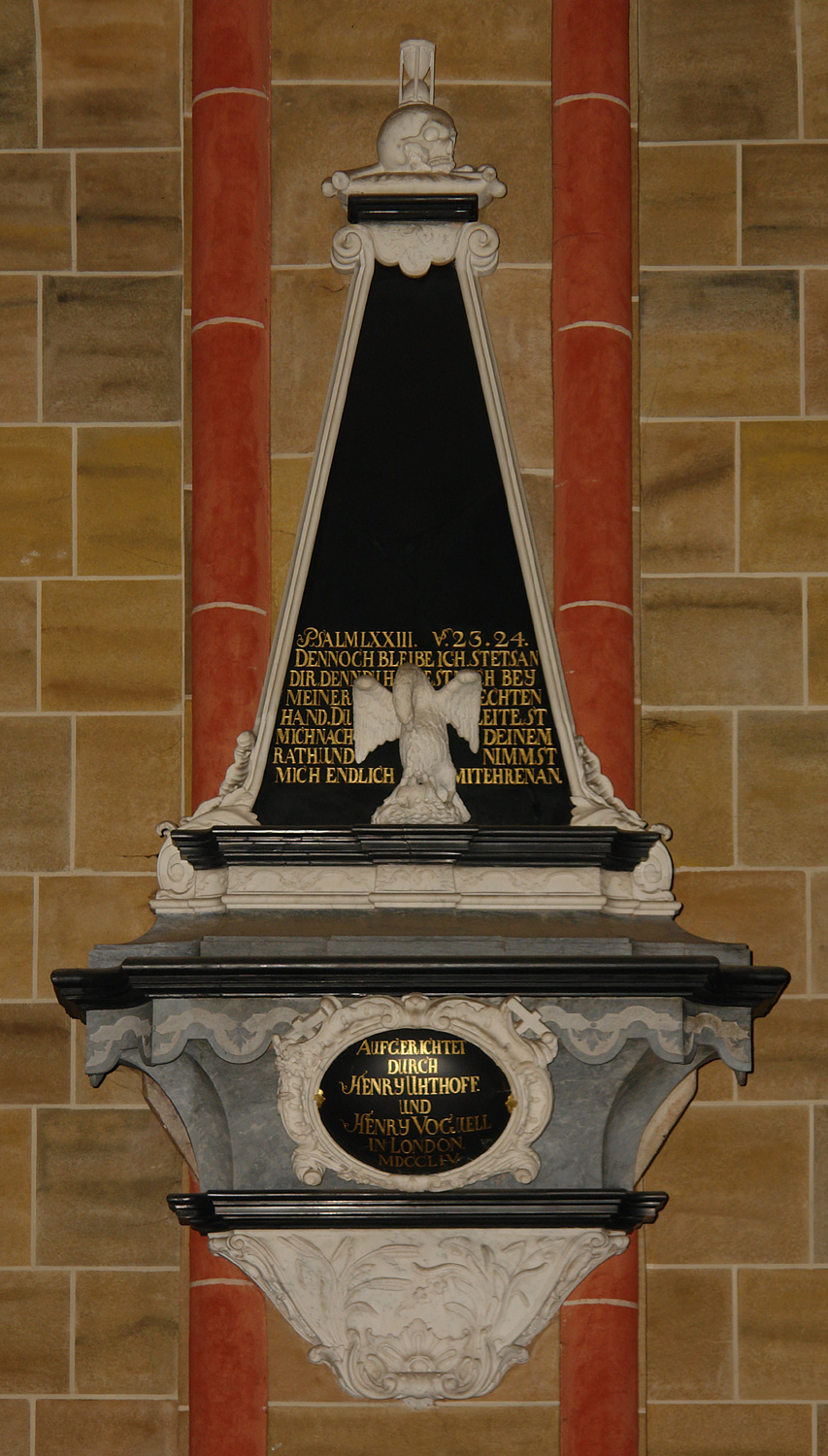 1980 wurde das Epitaph des Esquire Henry Voguel im St. Petri-Dom in Bremen durch Georg Skrypzak restauriert. Der gerissene Epitaphkörper aus schwarzem Marmor konnte ohne fremdes Material wiederhergestellt werden. Die fehlenden Rahmenprofile aus weißem Marmor mußten nach den erkennbaren Bruchkanten mit Stuckmarmor erneuert werden. Auf die Rekonstruktion der vermutlich reichen, naturalistisch ausgebildeten Endformen wurde verzichtet, da sie nicht ausreichend belegt waren. Bei Untersuchungen mit der UV-Lampe wurden Spuren der Signatur Theophil Wilhelm Freeses gefunden. Diese war mit Öl auf das weiß-marmorne Inschriftfeld aufgetragen. (Quelle: Bremisches Jahrbuch, 1983)